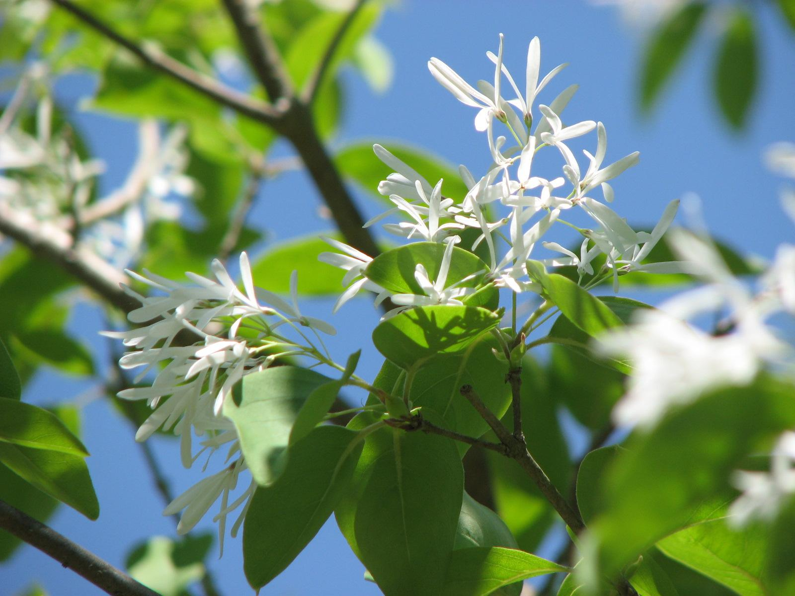 Chionanthus retusus(ヒトツバタゴの花)